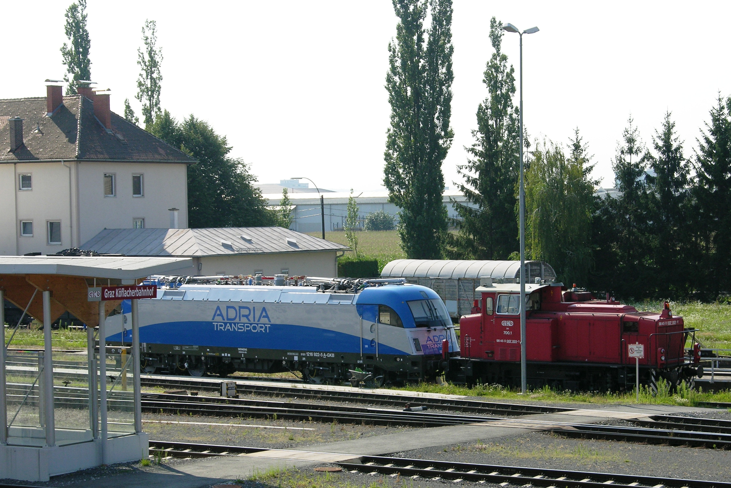 Adria Transport Lok Taurus 1216.922 und GKB 98 45 0 007 001-1.